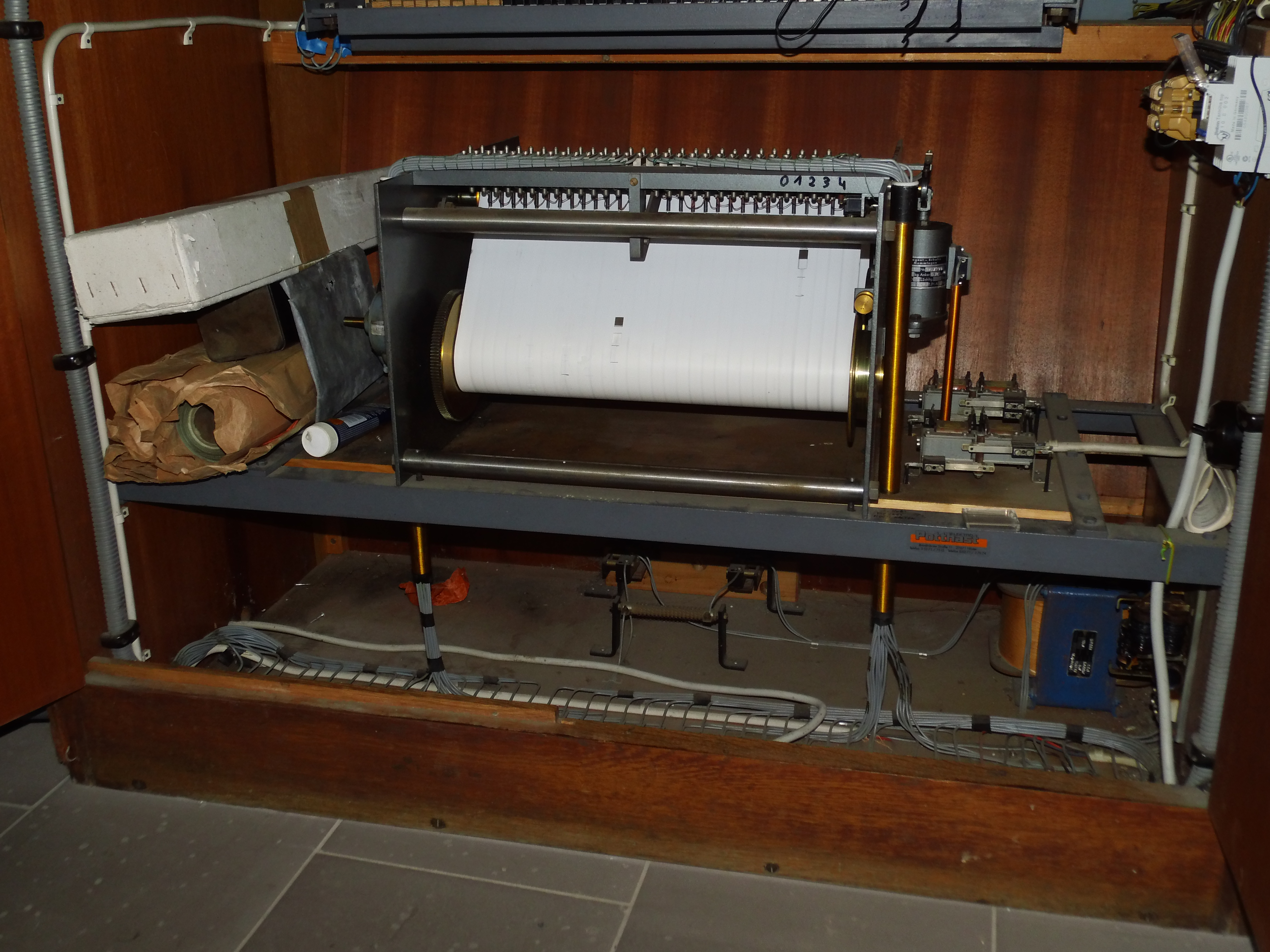 Spielmechanismus der Fa. Korthage für Glockenspiel im Turm des histor. Rathauses Höxter